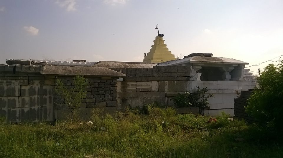 బెక్కంటి రామాచల గుట్ట